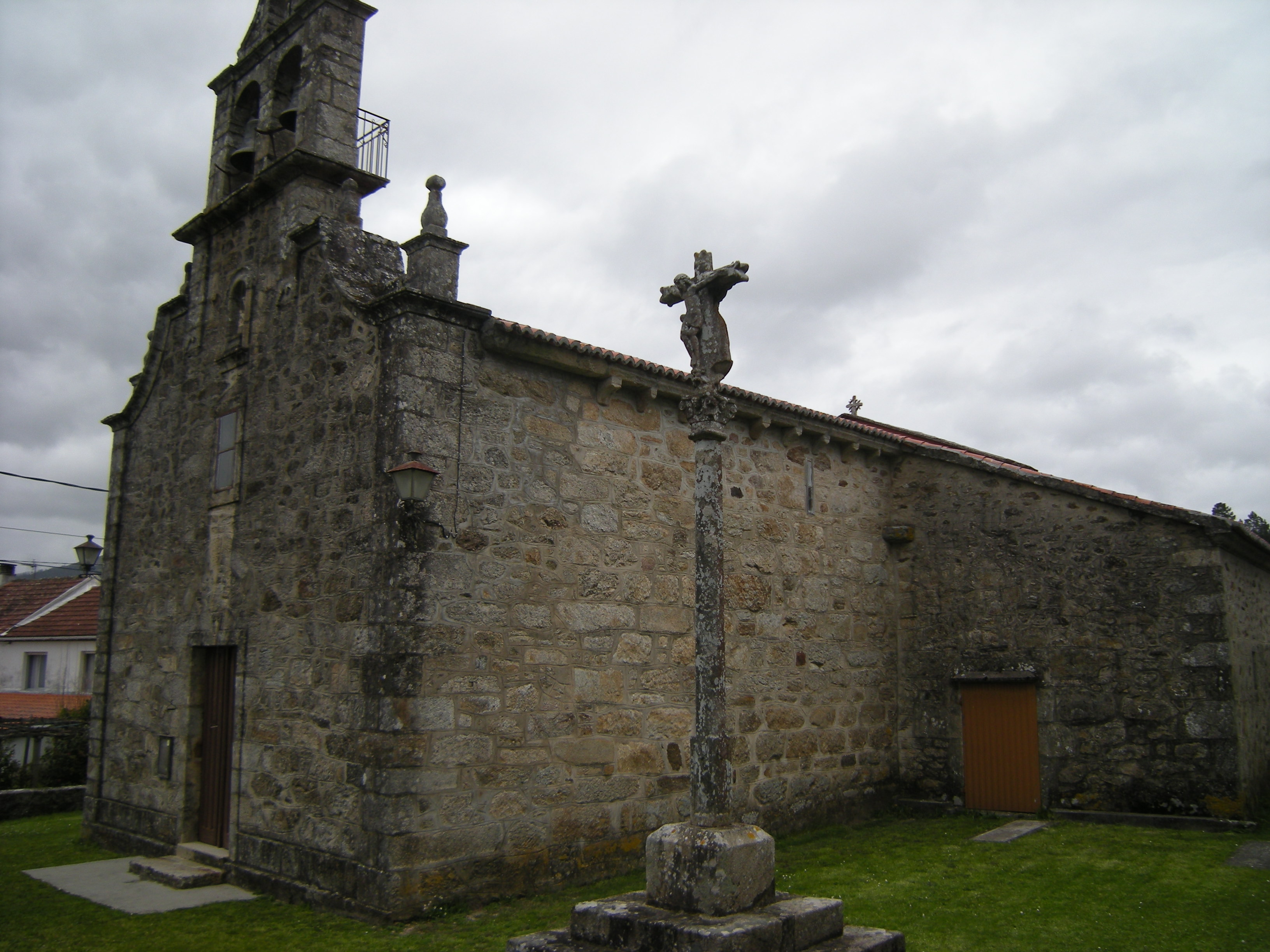 Iglesia románica de planta de nave única y ábside rectangular. La fachada es moderna, así como la sacristía adosada al muro sur de la cabecera.